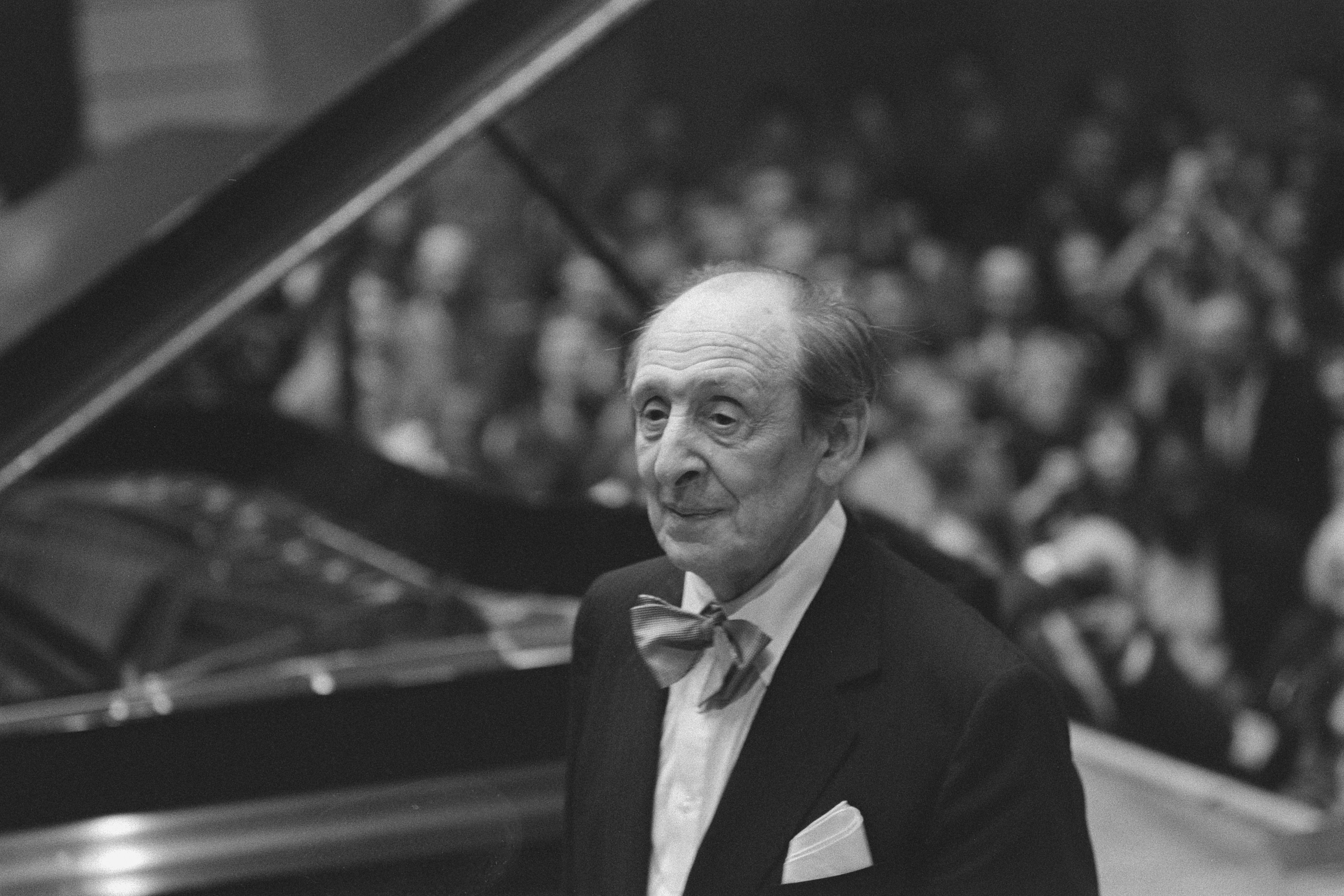 Collectie / Archief : Fotocollectie Anefo Reportage / Serie : [ onbekend ] Beschrijving : Concertpianist Vladimir Horowitz in Concertgebouw in Amsterdam; Horowitz na afloop Datum : 23 november 1986 Locatie : Amsterdam, Noord-Holland Trefwoorden : pianisten Persoonsnaam : Horowitz Fotograaf : Gerrits, Roland / Anefo Auteursrechthebbende : Nationaal Archief Materiaalsoort : Negatief (zwart/wit) Nummer archiefinventaris : bekijk toegang 2.24.01.05 Bestanddeelnummer : 933-8218